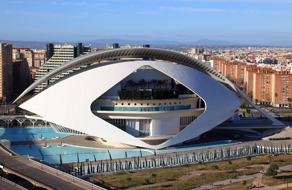 Ciudad de las Artes y las Ciencias. Valencia